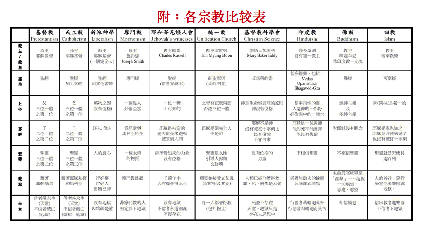 中文（台灣）: 區分異教、異端的表格